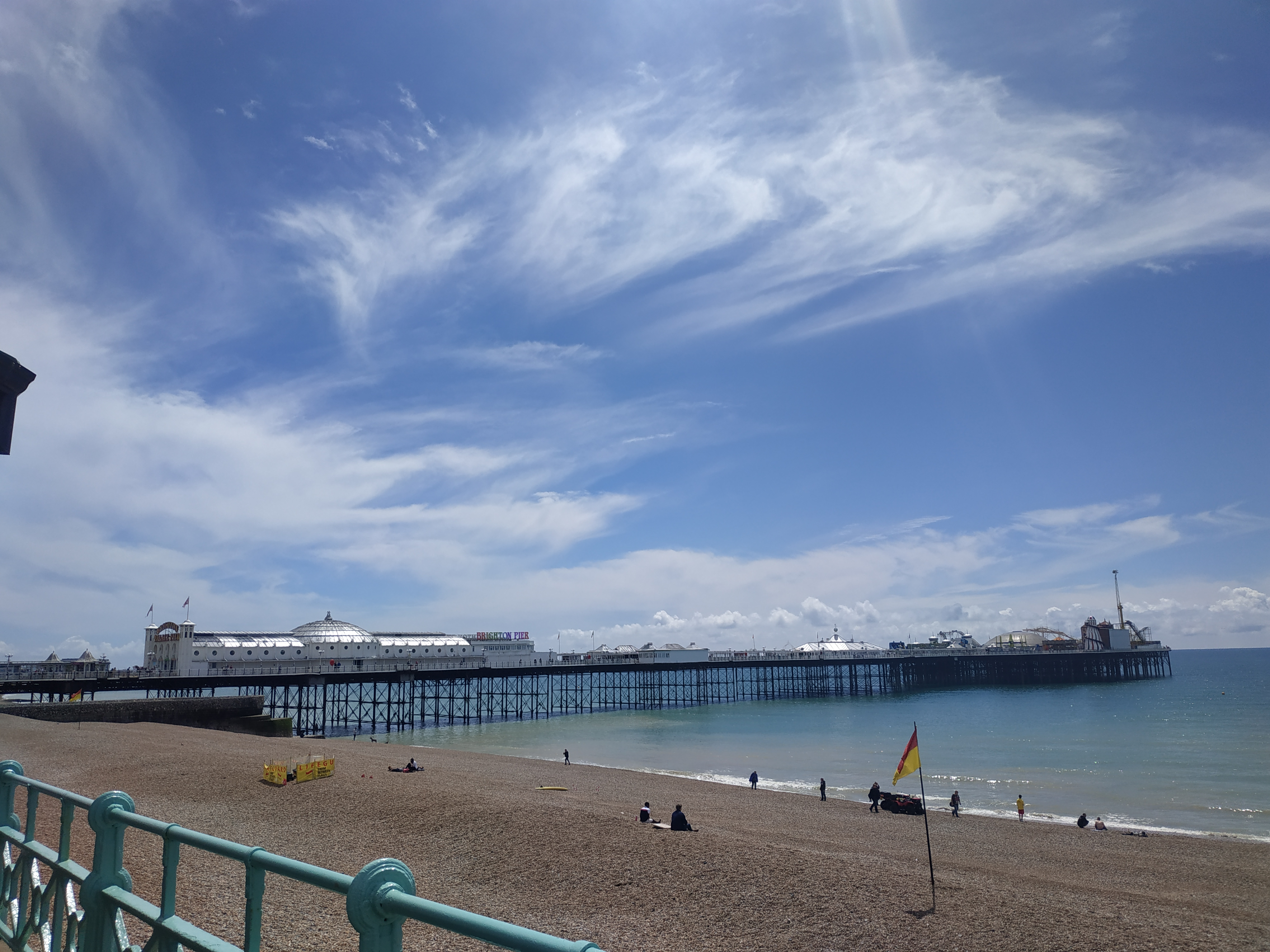 La foto muestra la playa y el muelle de Brighton (ciudad del sur de Inglaterra) en un día soleado de junio de 2019.